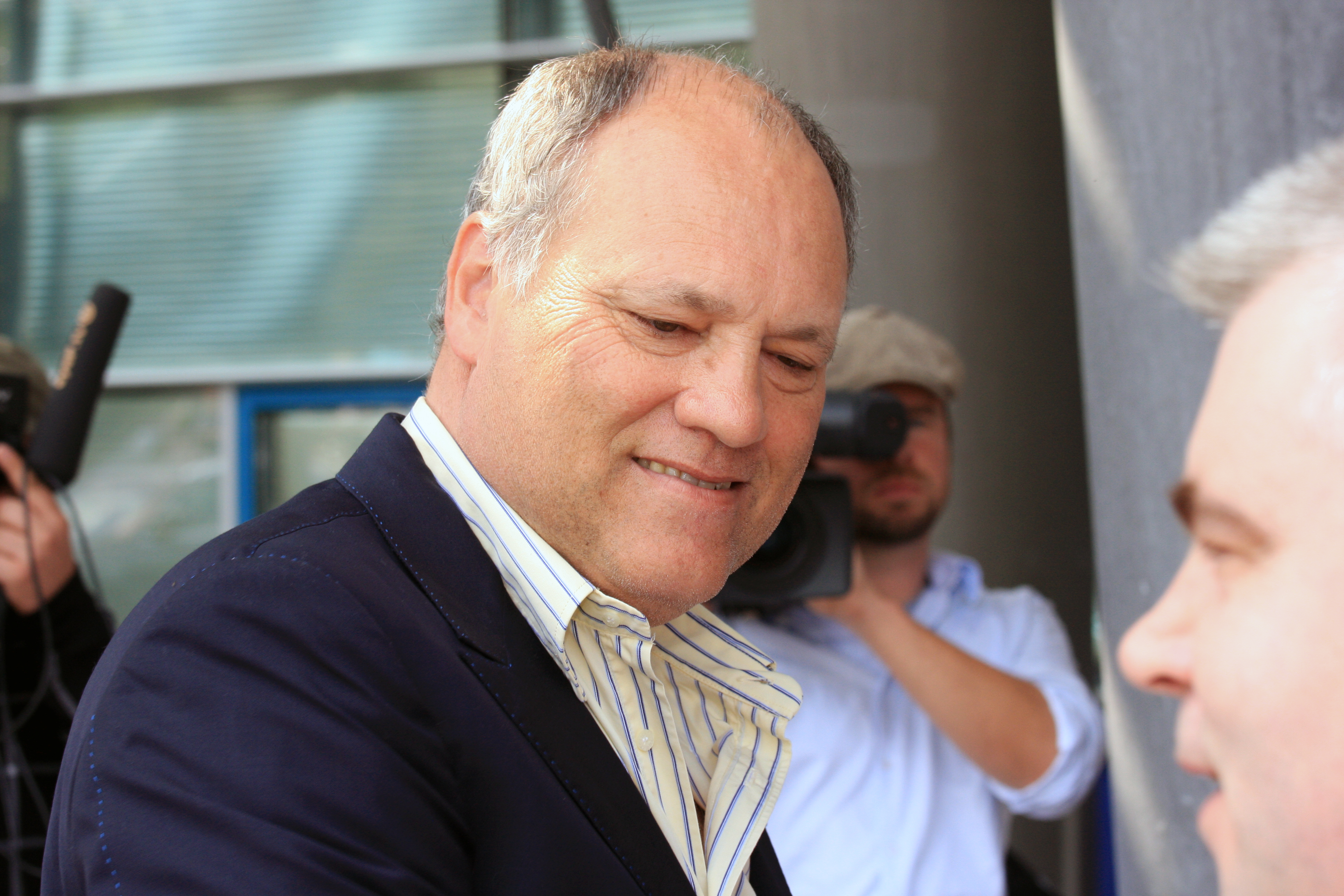 Martin Jol an der HSH Nordbank- Arena am Tag nach dem letzten Spieltag der Saison 08/09.